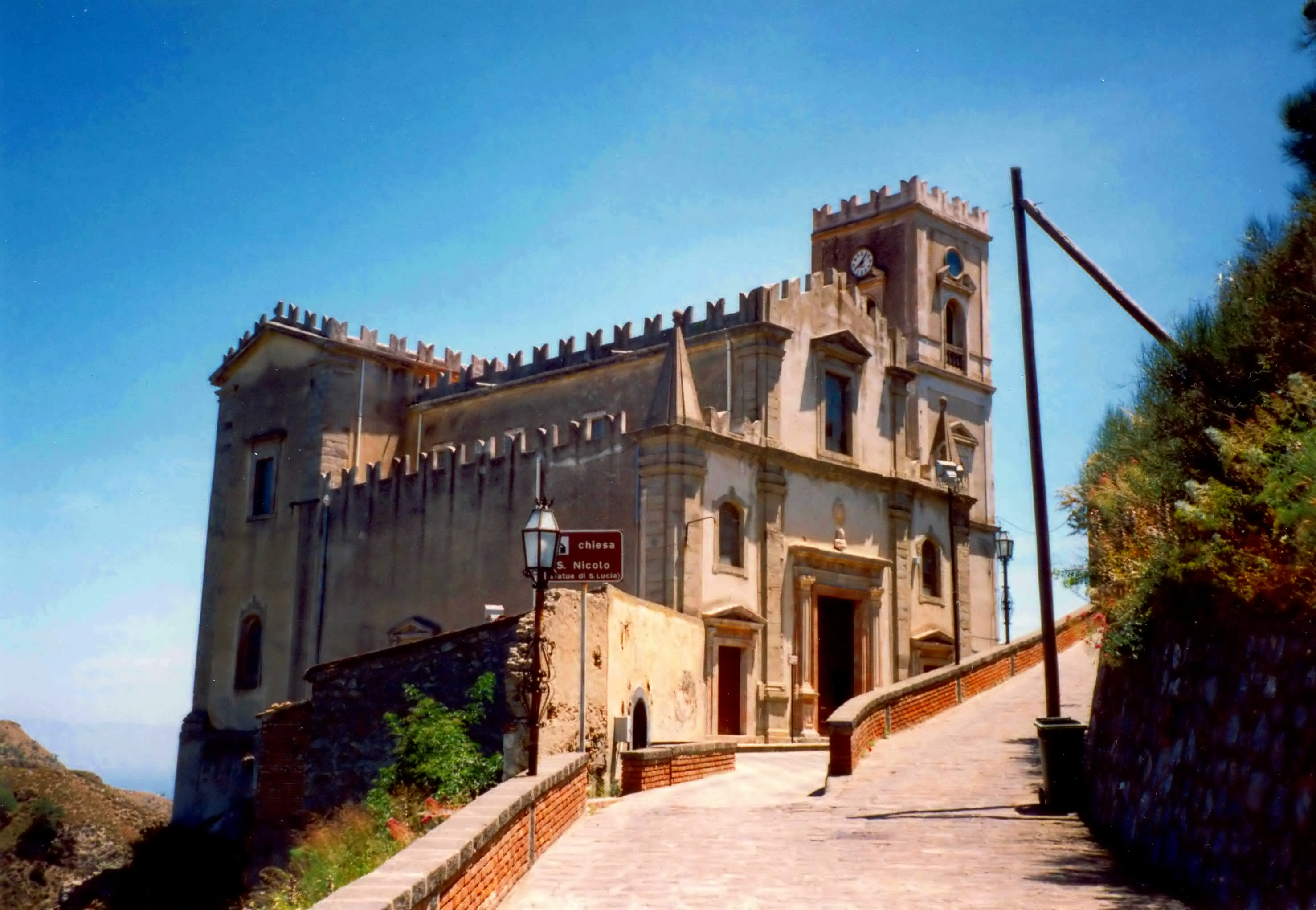 Die Kirche St. Nicolo in Savoca / Sizilien.